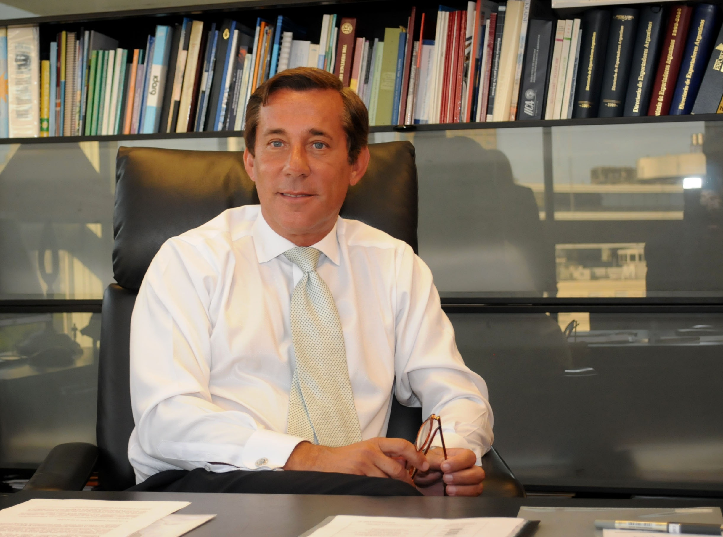 Embajador argentino en Brasil